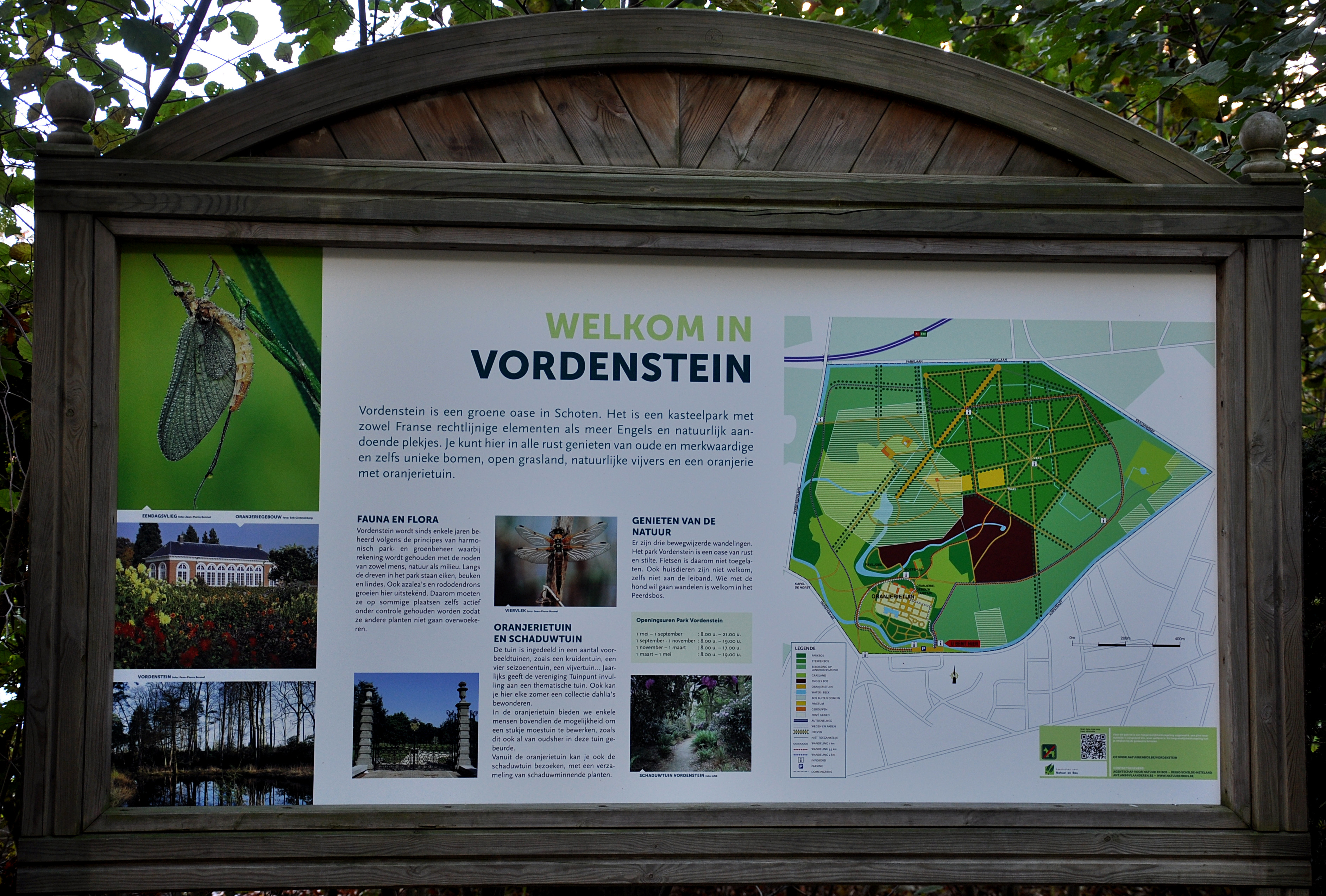 Domein Vordenstein, Schoten, Belgium